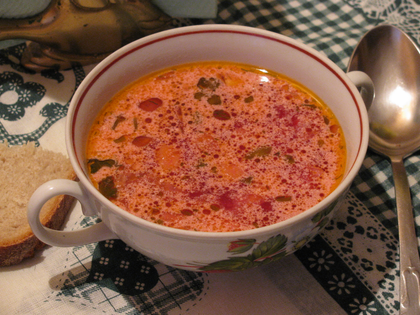 Борщ. Суп овочевий, зварений на м'ясо - кістковому росолі та сметані